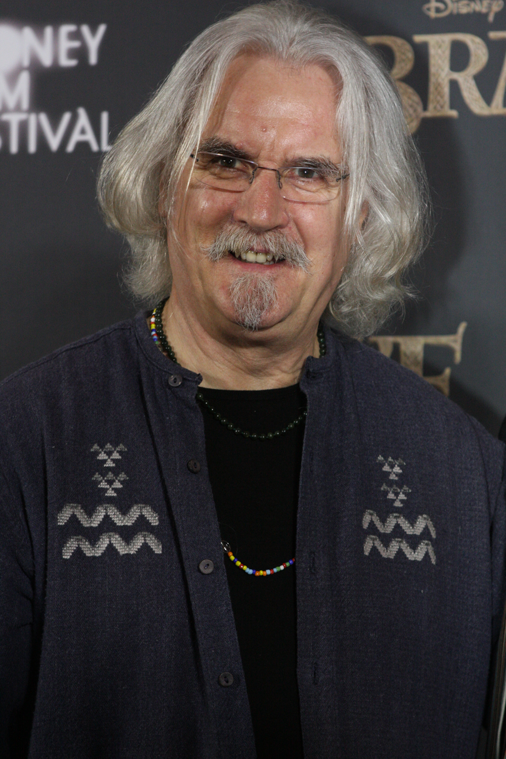 Billy Connolly durante la première de la película Brave en el Festival de Cine de Sidney